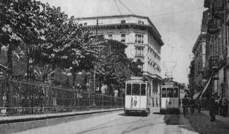 Cremona, incrocio tram